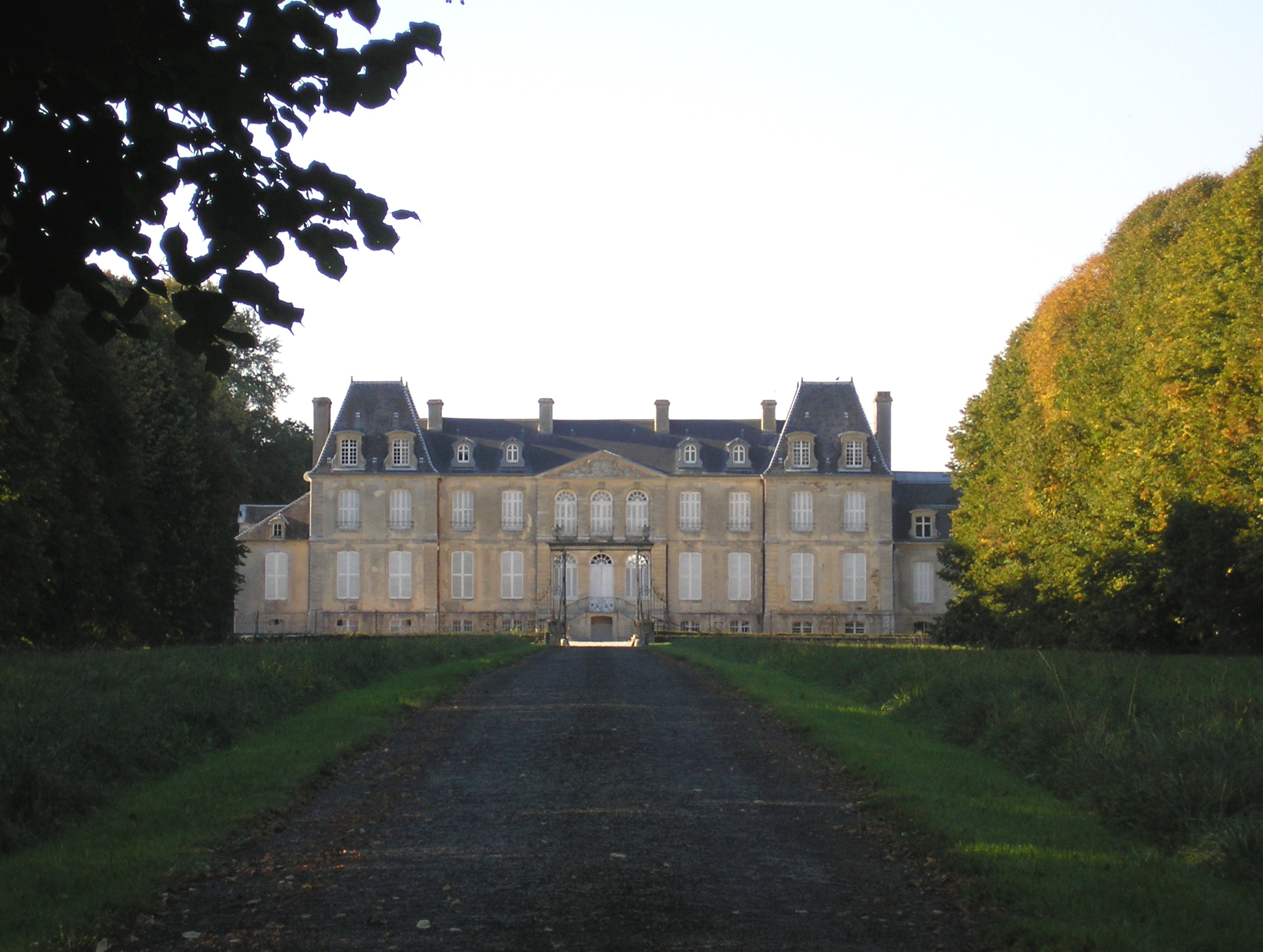 Vaubadon (Normandie, France). Le château.